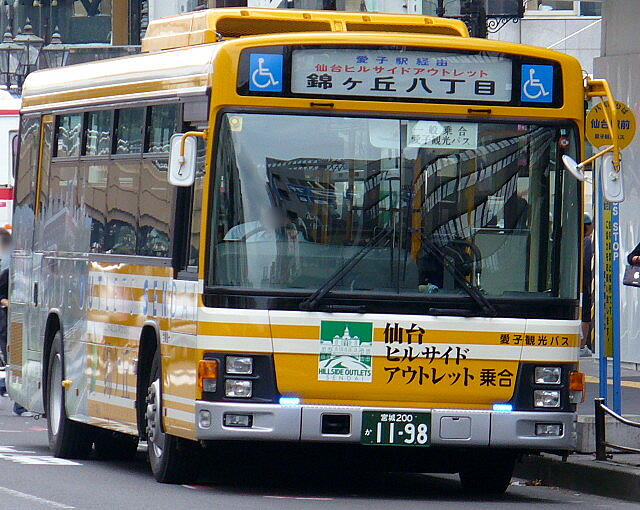 愛子観光バス（路線バス）